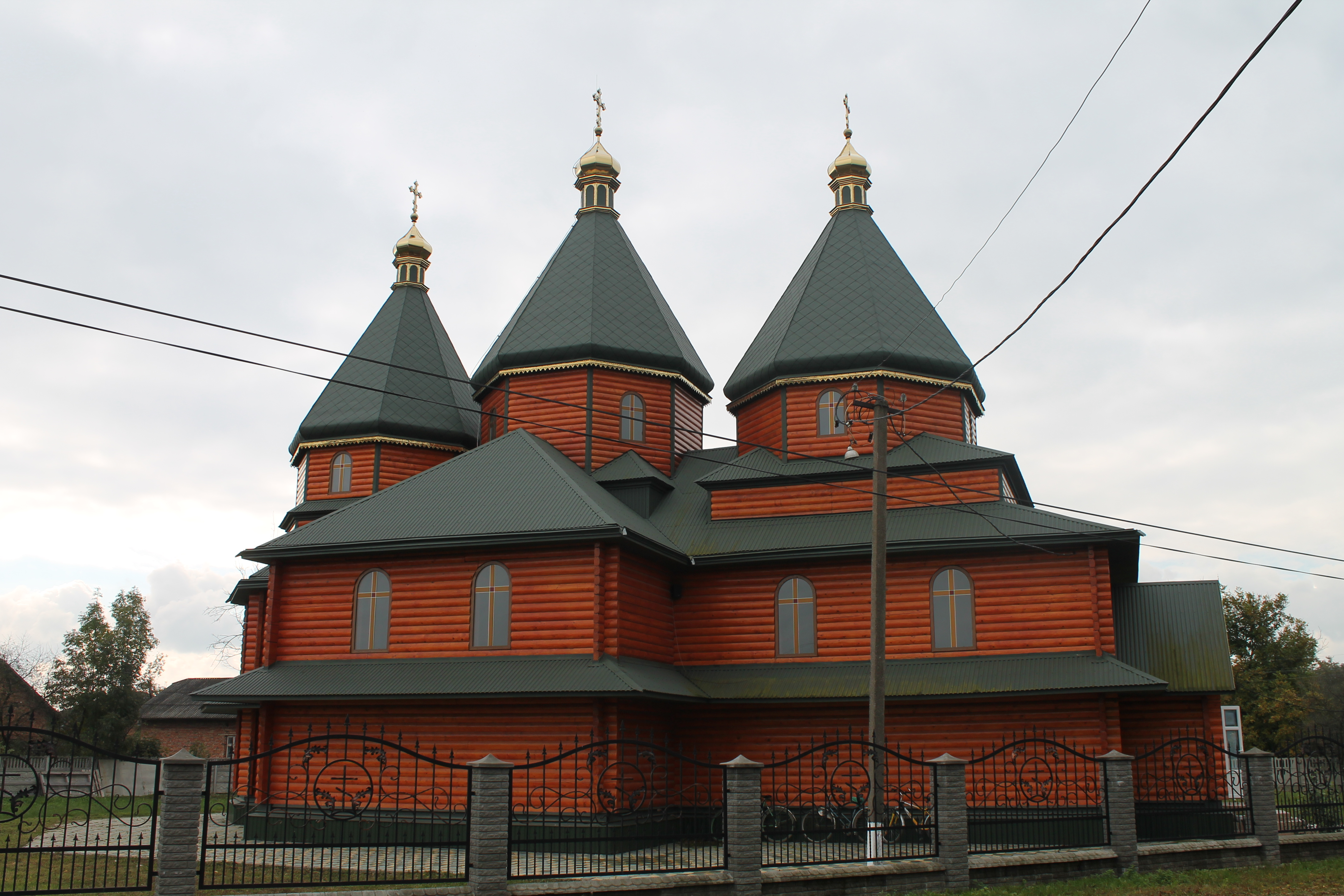 Миколаївська церква (дер.), с. Реваківці